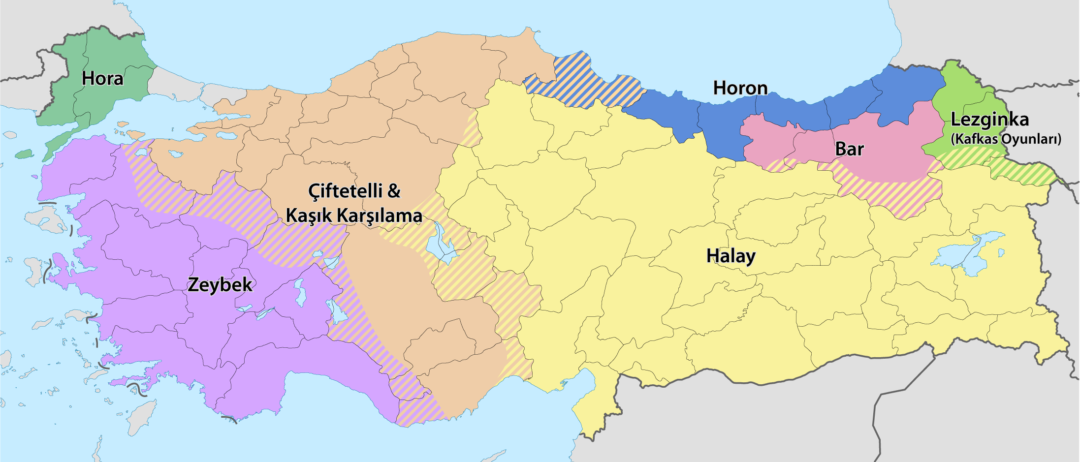 Verbreitungskarte der türkischen Volkstänze